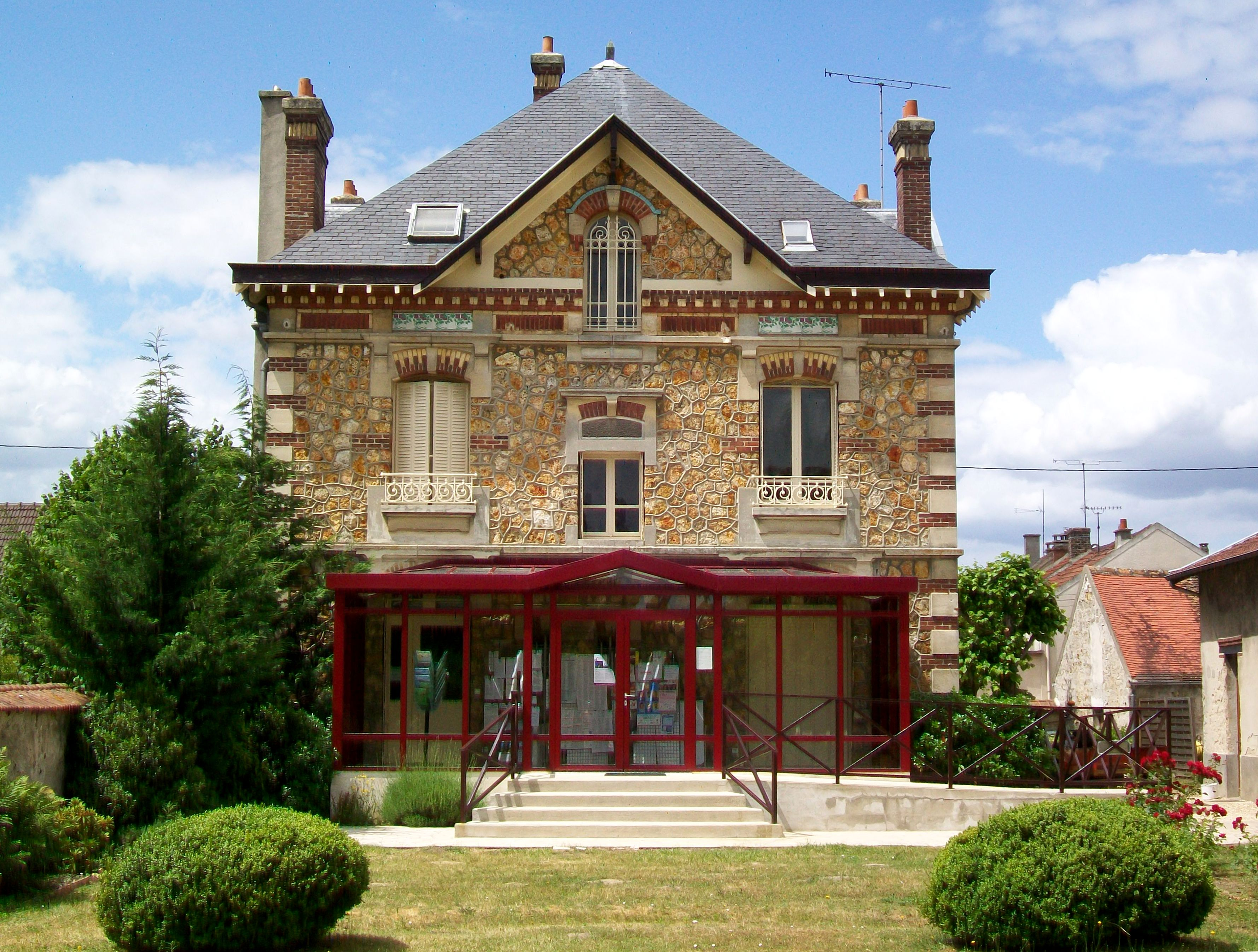 La mairie de Seugy, côté entrée, sur le parc situé à l'arrière du bâtiment.